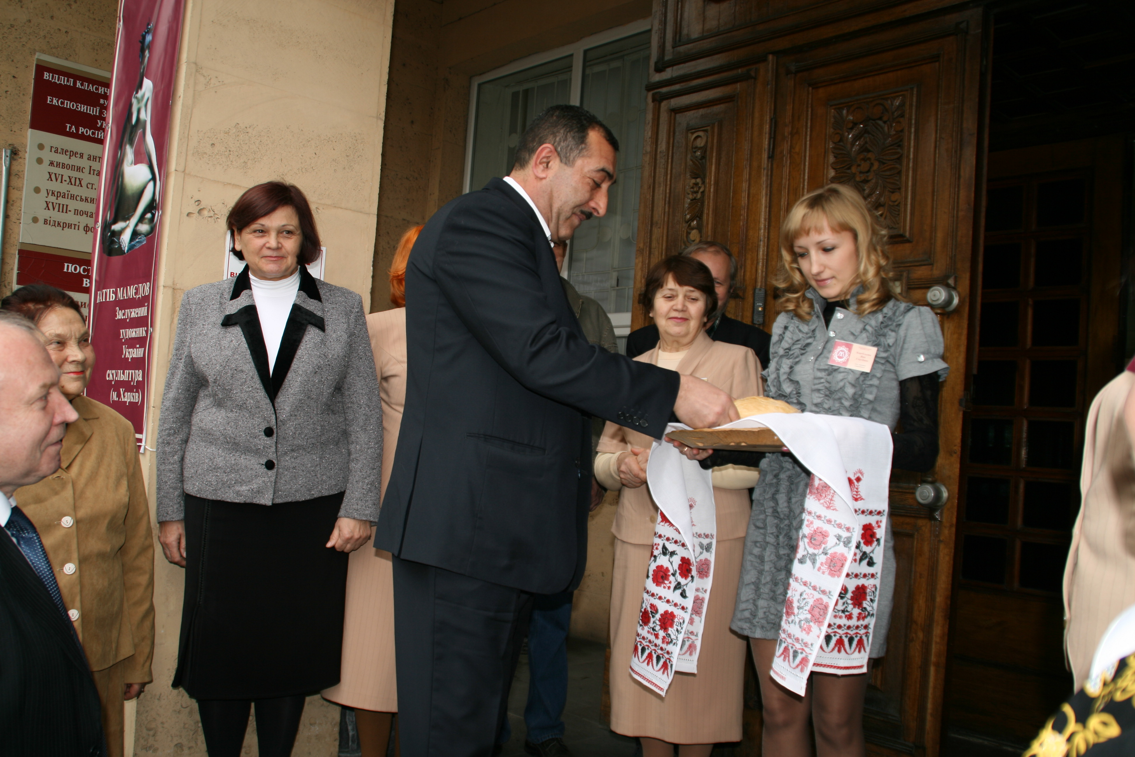 Открытие выставки в Луганске «Жiнка — це натхнення», 2012 год